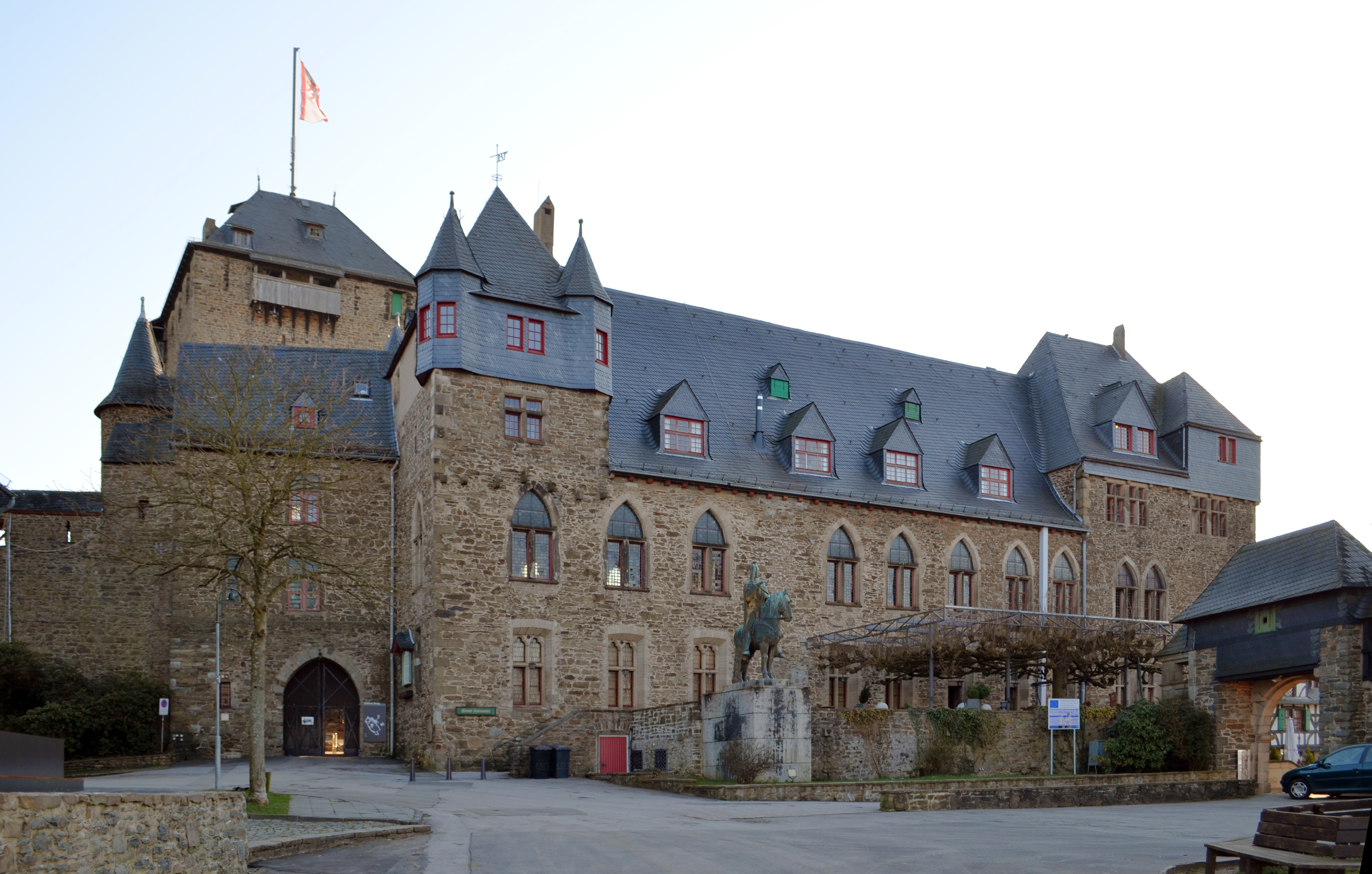 Schloss Burg in Solingen, Nordwest-Ansicht des Palas This image was created with Hugin